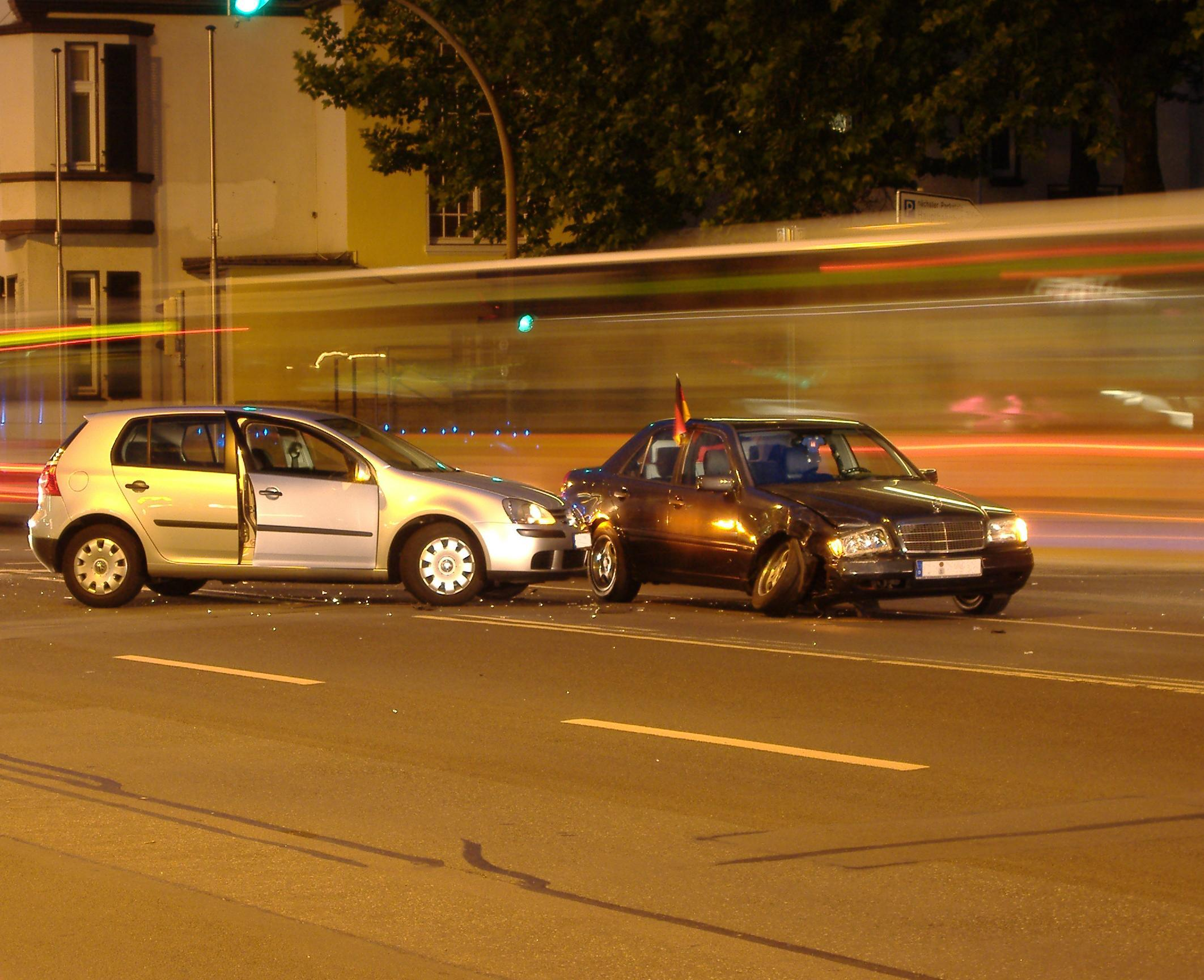 Beschreibung: Autounfall zwischen einem Vw und einem Mercedes.